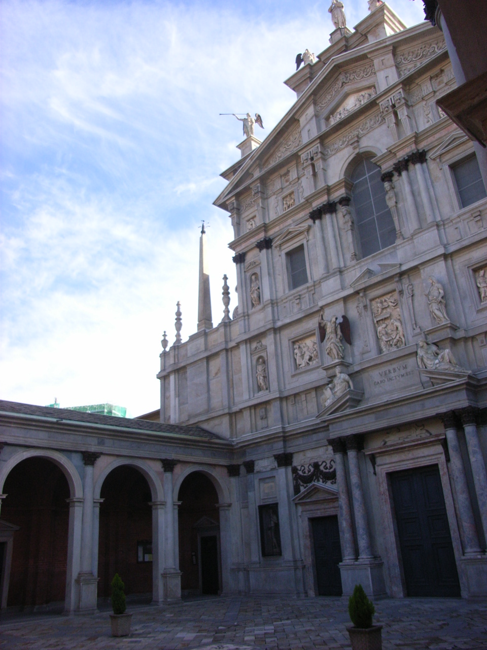 Facciata e quadriportico di Santa Maria dei Miracoli a Milano